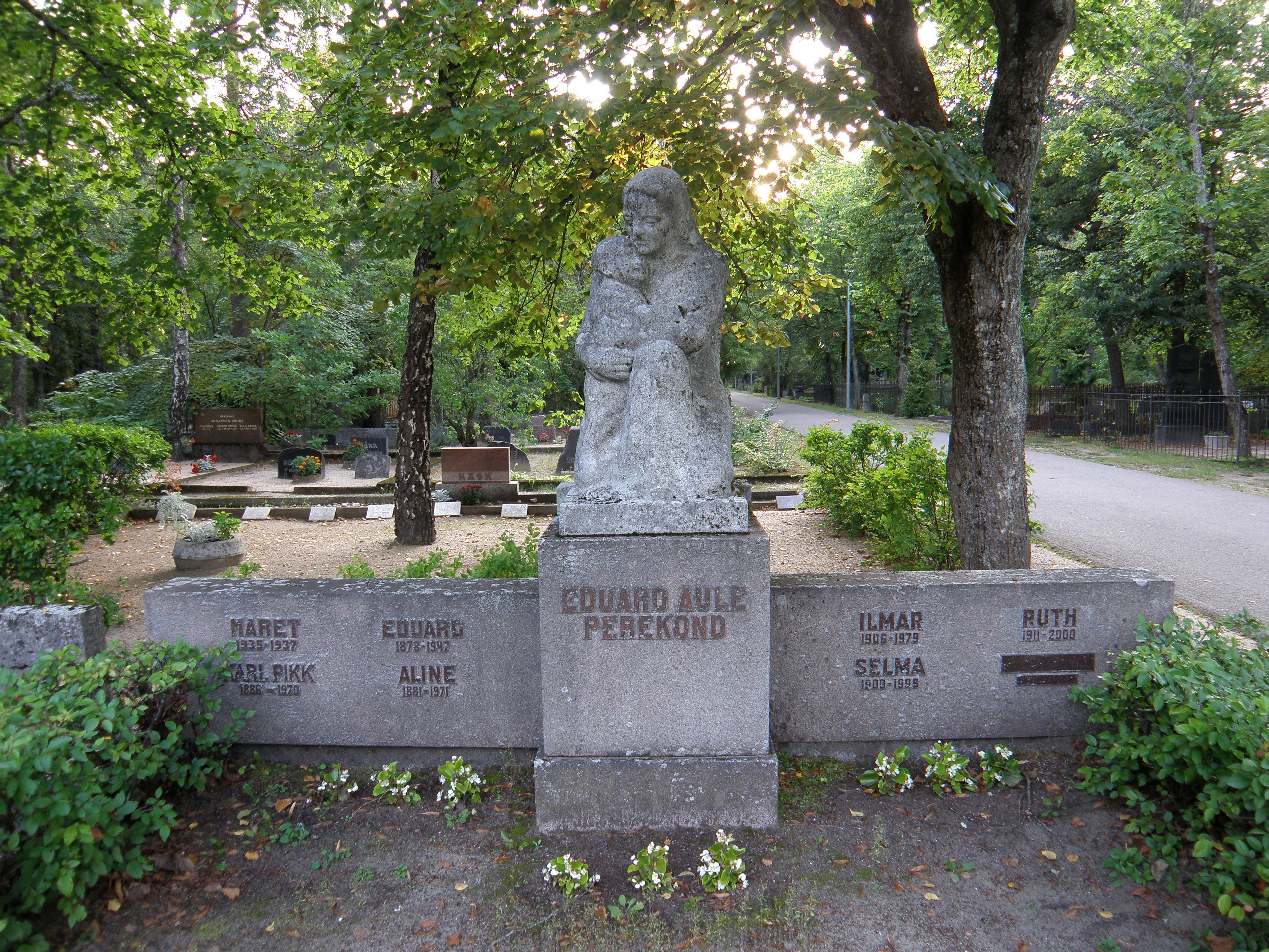 Perekond Aule hauamonument